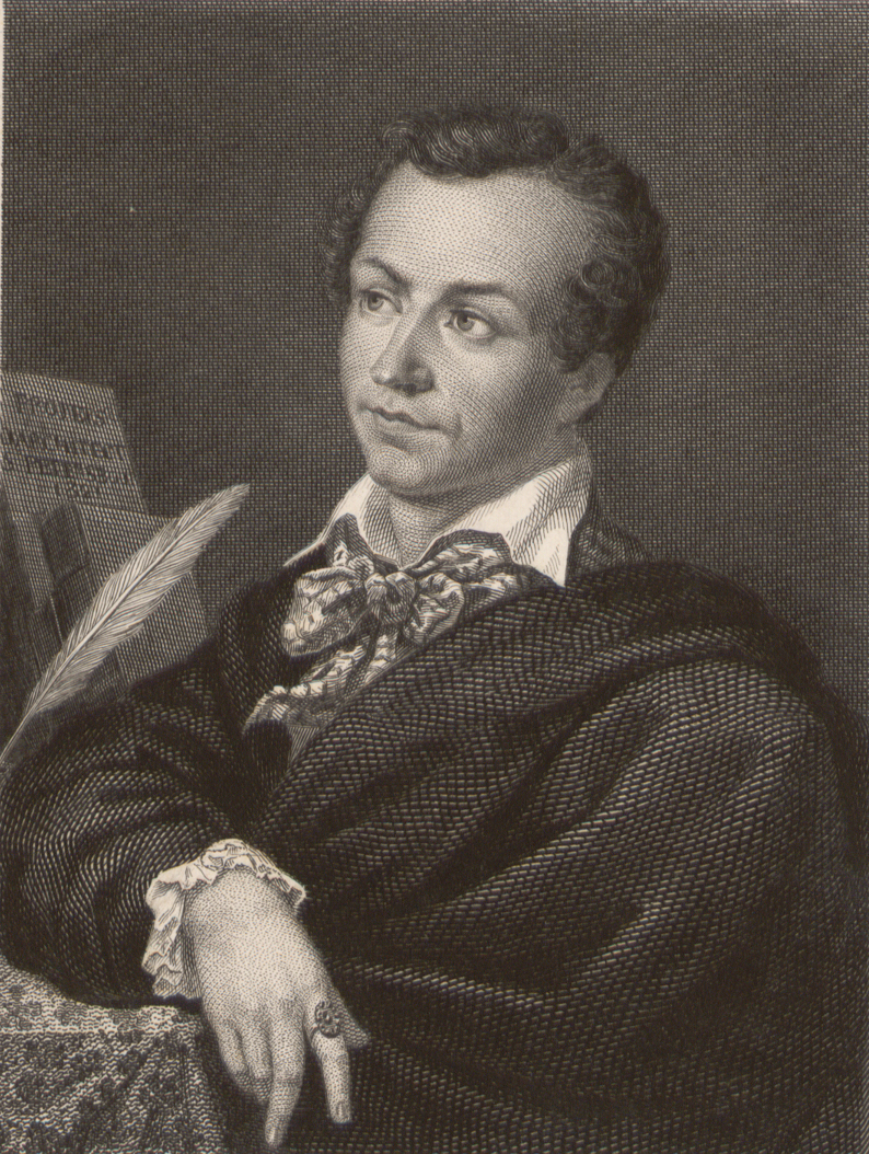 Marie-Antoine Carême, 8 juin 1784 - 12 janvier 1833.